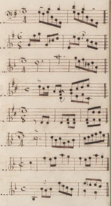 Table du volume X des manuscrits de Venise (incipit des sonates 15 à 22, K. 432 à 439).